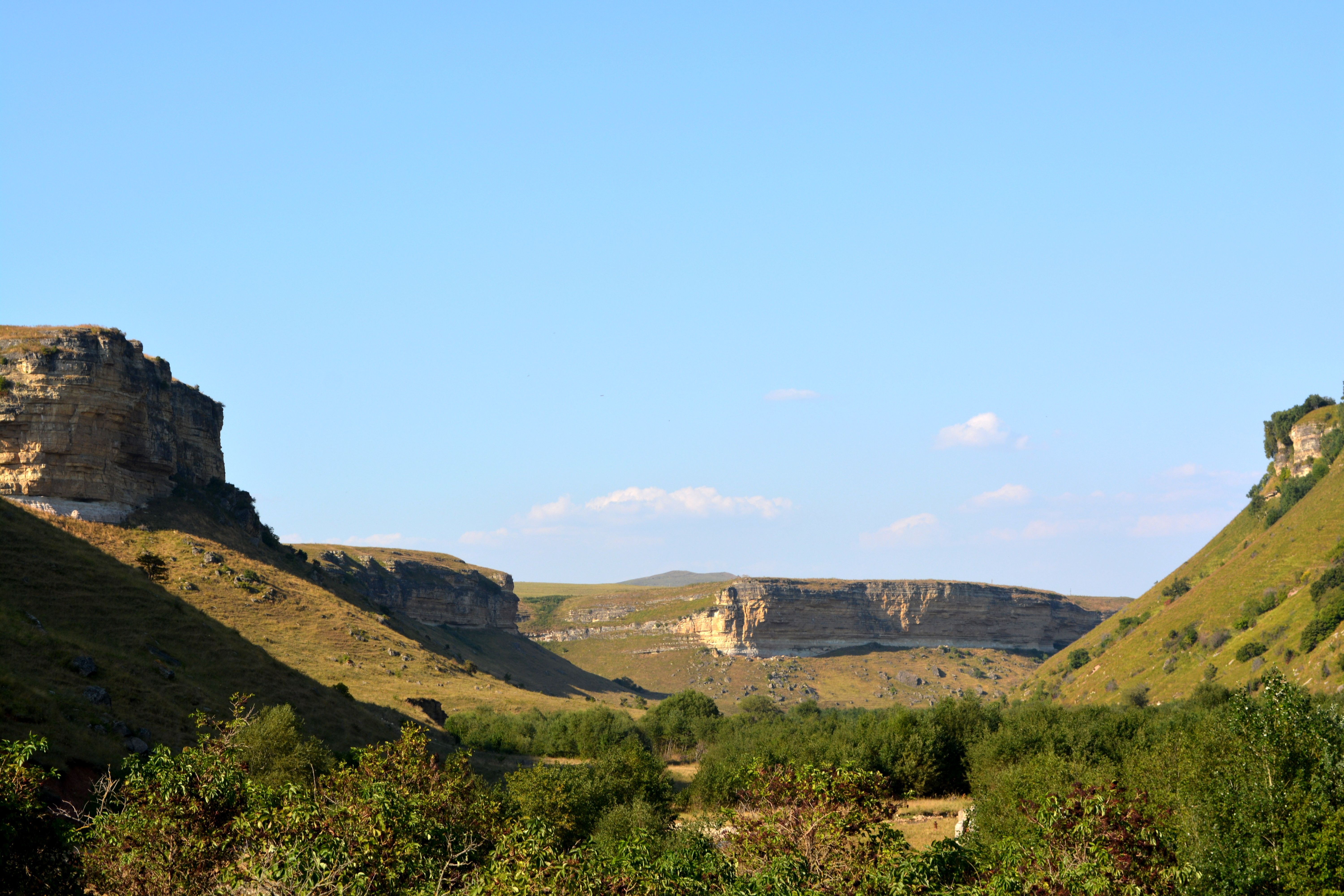 Долина